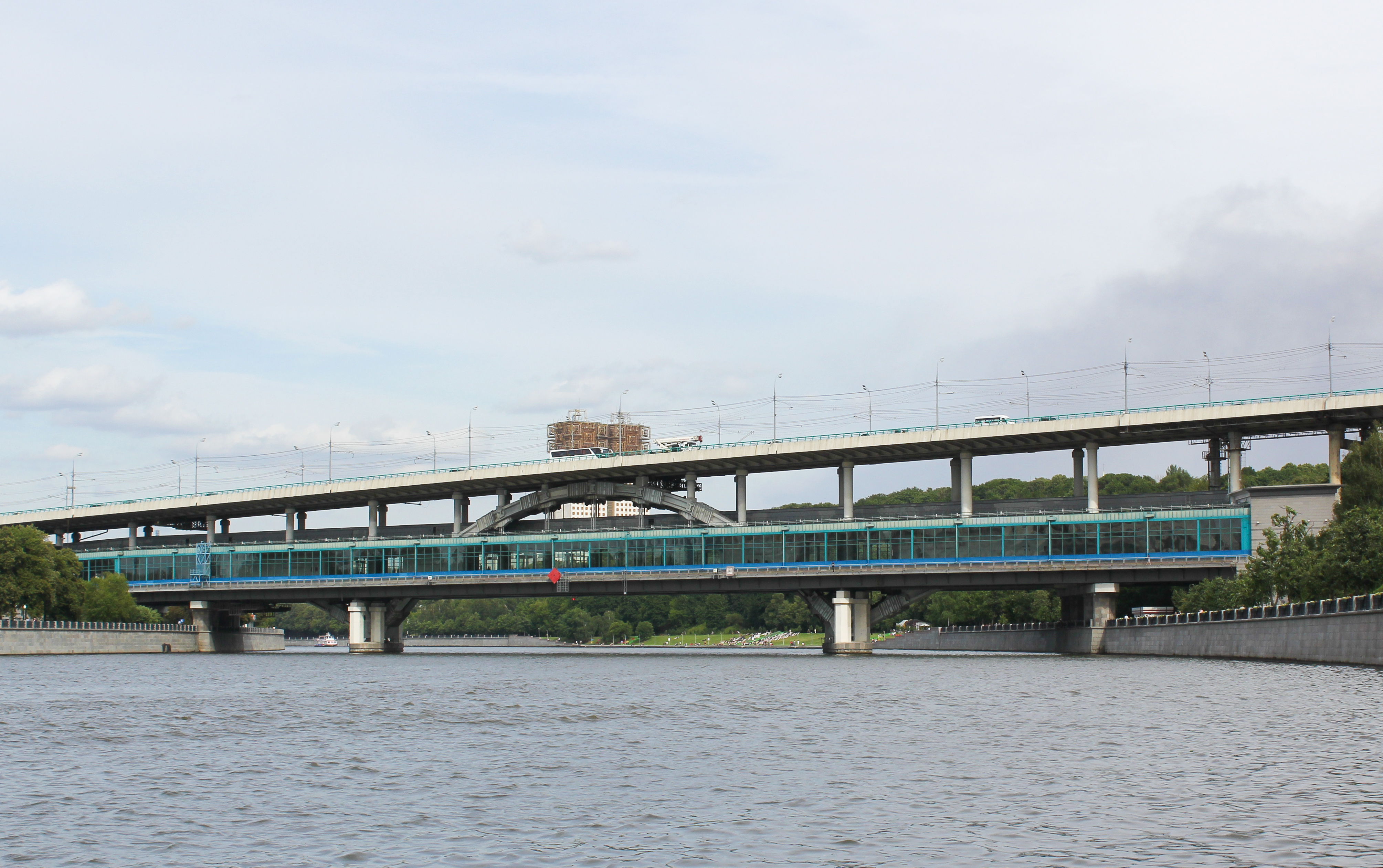 Вид на Лужнецкий метромост с набережной в заказнике Воробьевы горы